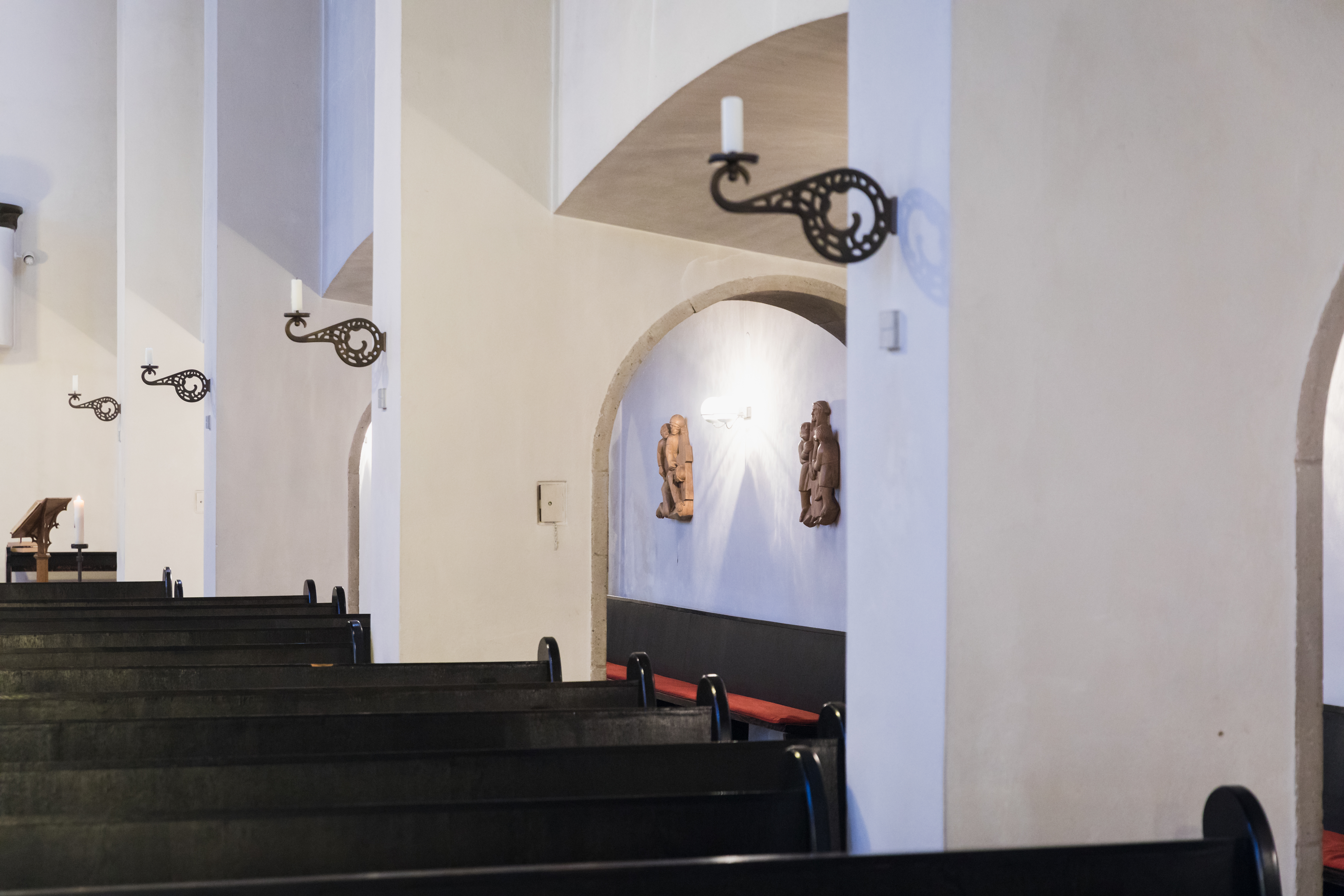 Kirche Heilig Kreuz, Köln-Weidenpesch. Architekt: Heinrich Bartmann, 1931. Blick ins südliche Seitenschiff